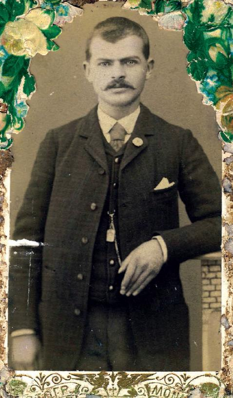 Велко Николов